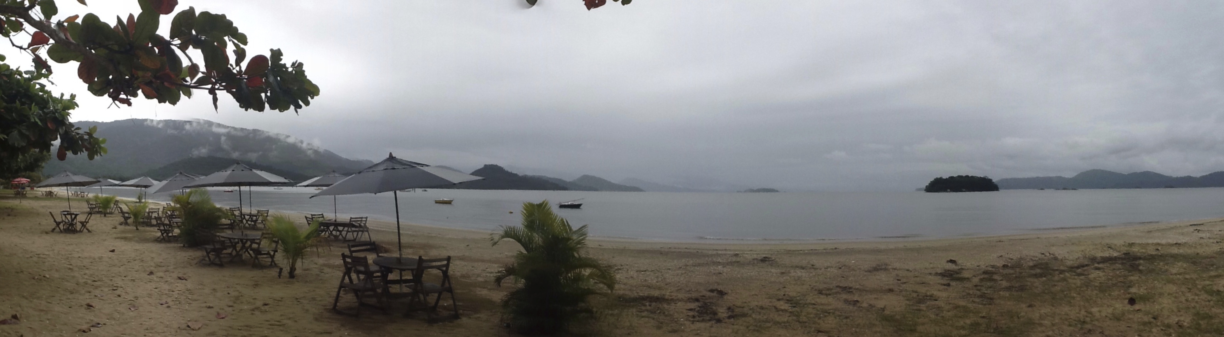 Praia de Jabaquara - Paraty, RJ